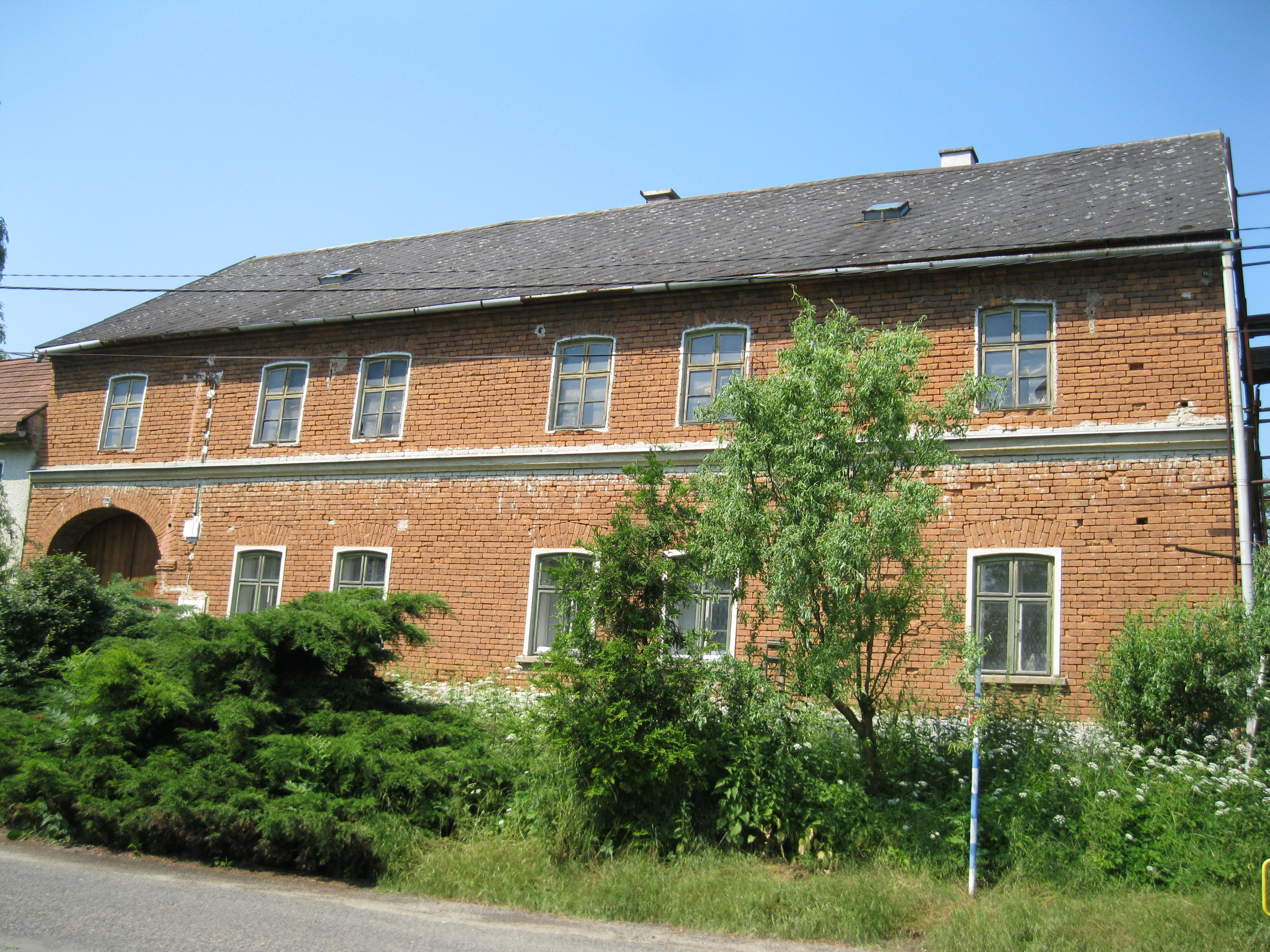 Venkovská usedlost (Kníničky), náves 2, Kníničky